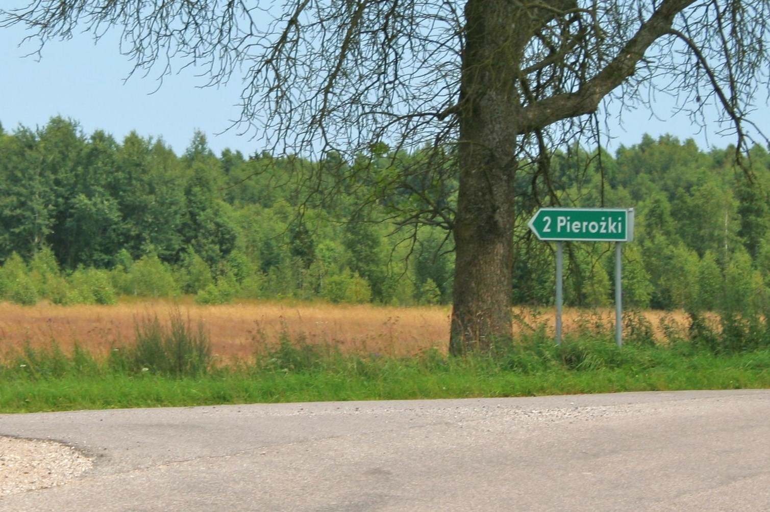 Zjadz do wsi Pierożki w Ostrówku.